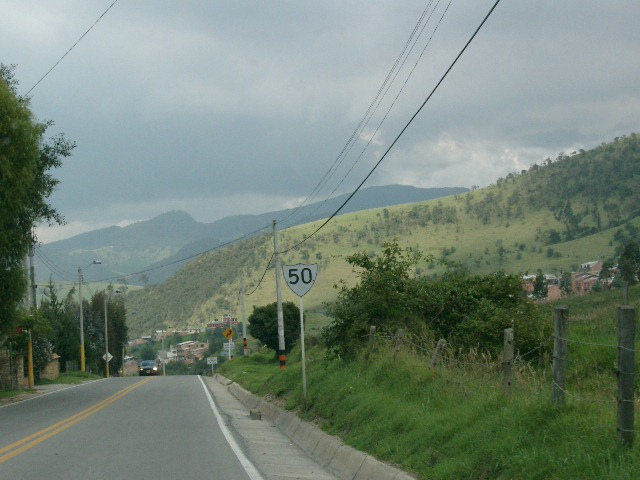 Ruta Nacional 50, La Calera, Cundinamarca, Colombia